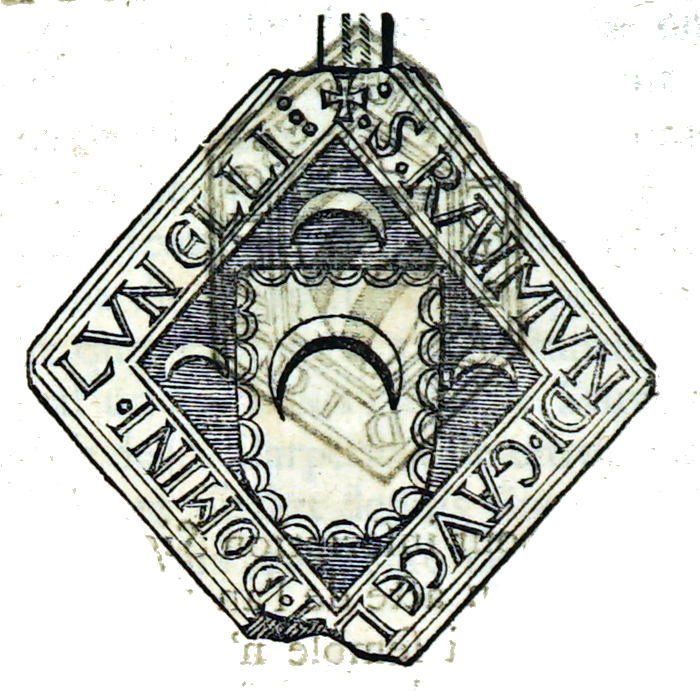 provenant de "nouveau traité de diplomatique...".